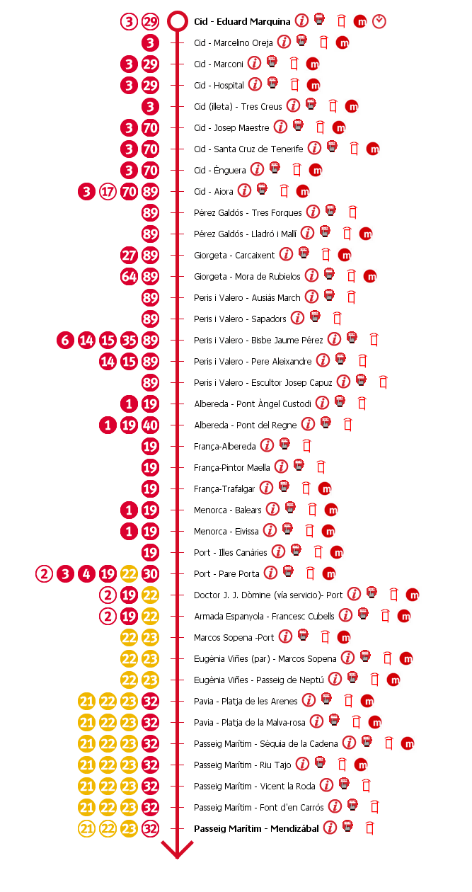 Esquema de paradas de la línea 20 de EMT Valencia